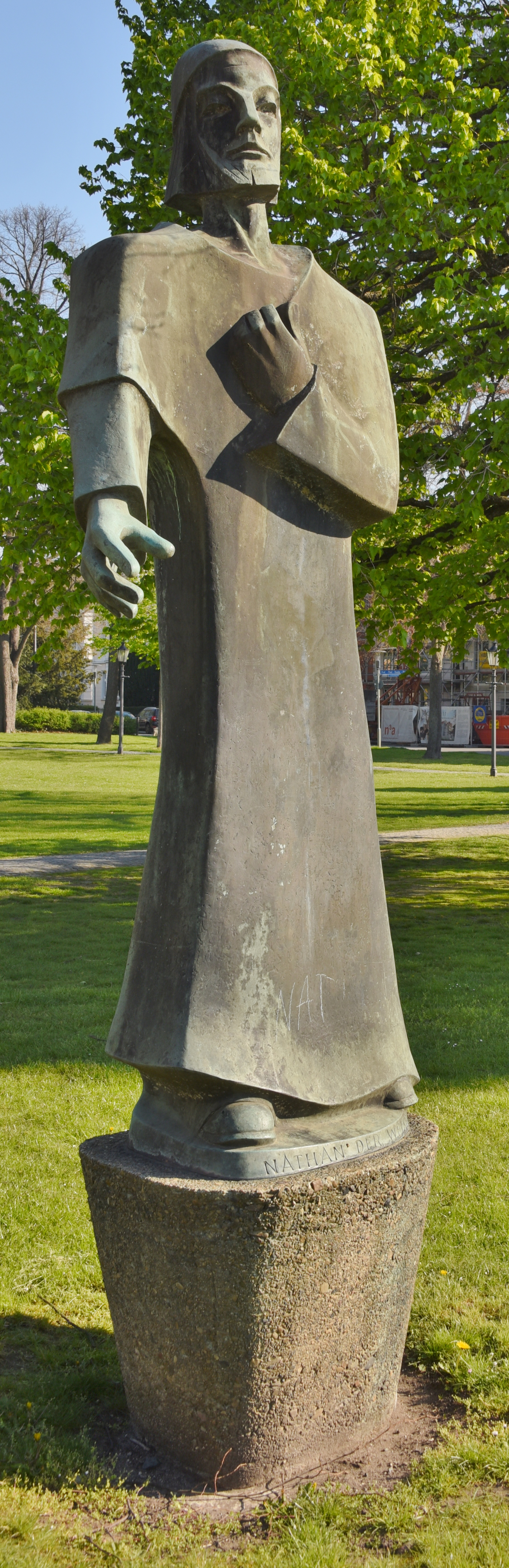 Nathan der Weise -Statue in Wolfenbüttel